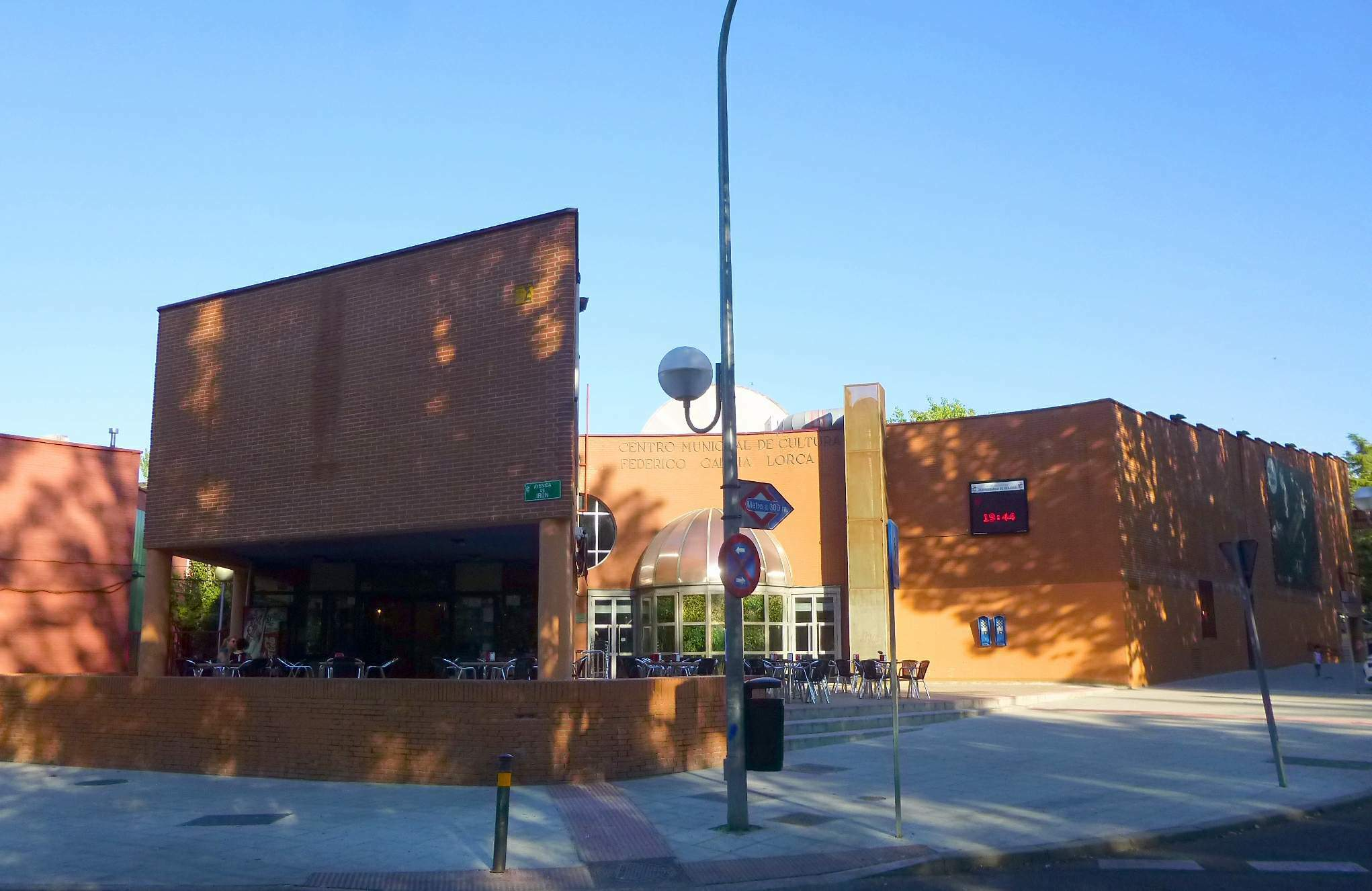 San Fernando de Henares - Centro Municipal de Cultura Federico García Lorca